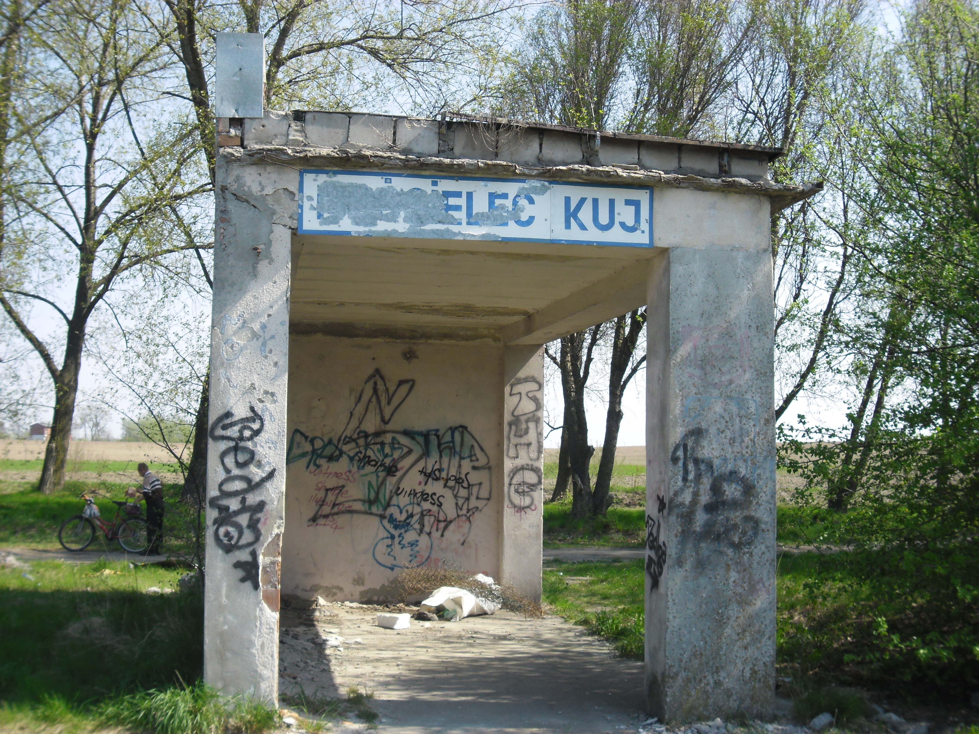 Rozebrana wiata przystankowa przystanku Kościelec Kujawski